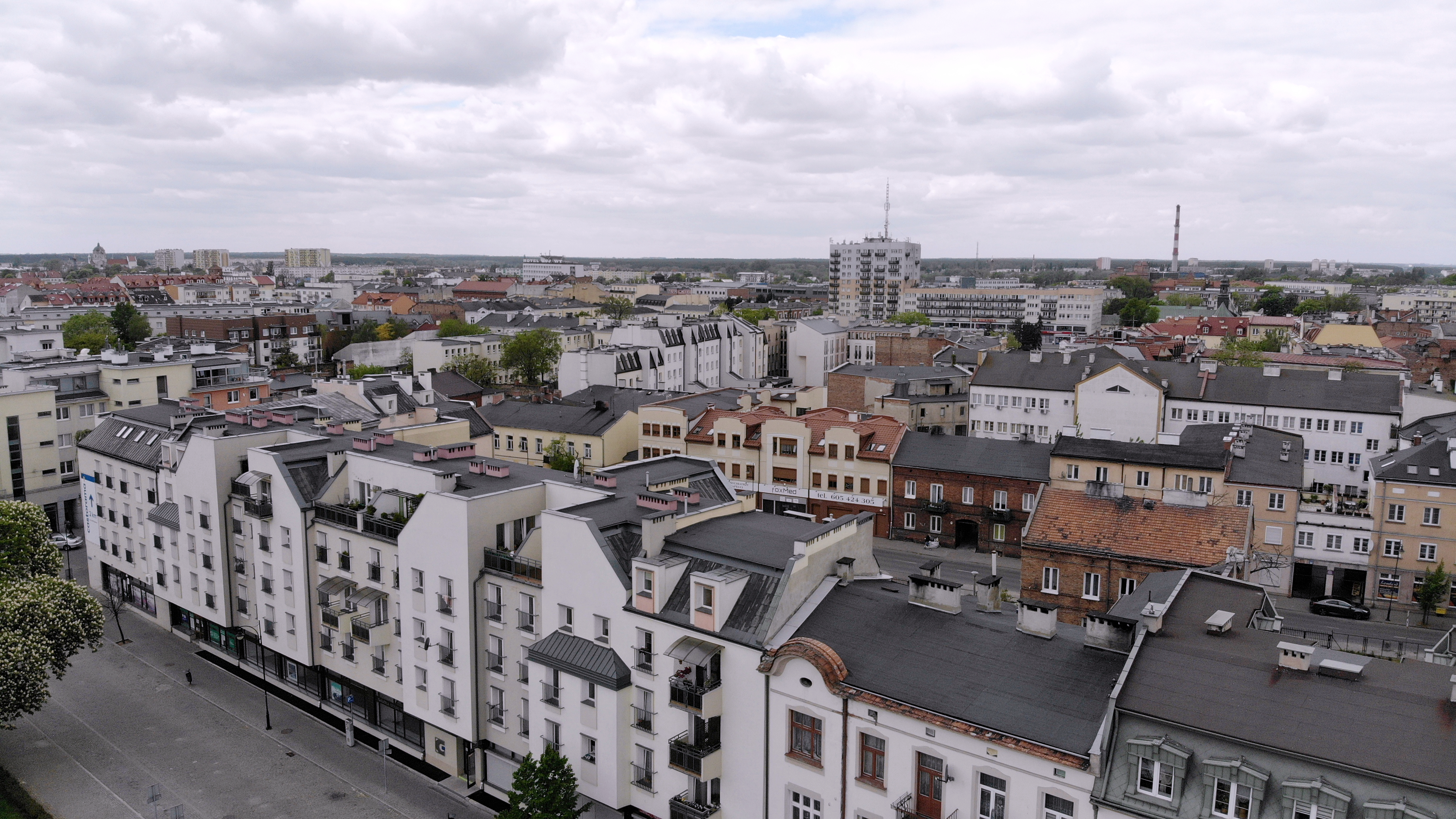 Śródmieście (2020 r.)